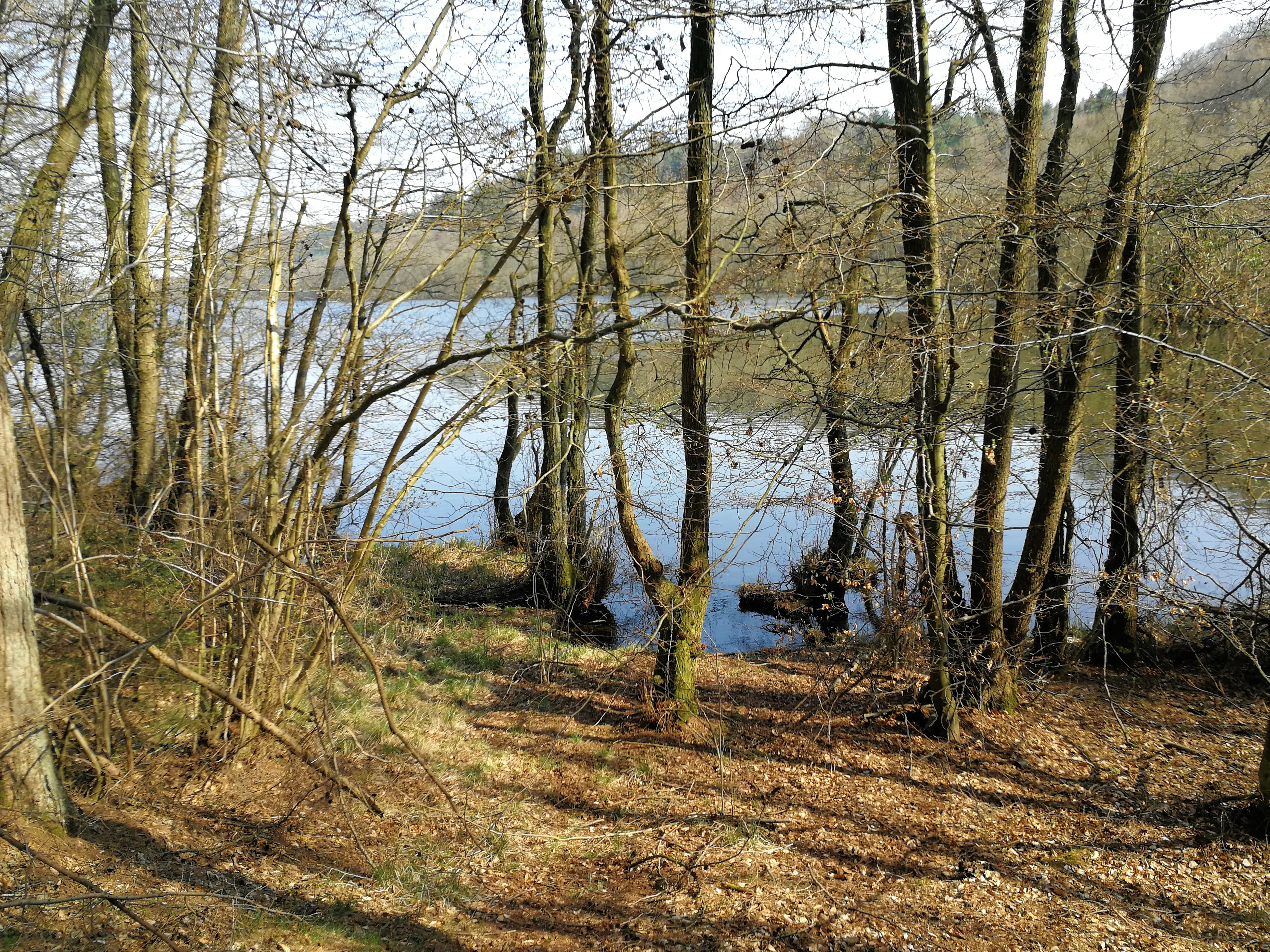 Vestenden af Thorsø set mod sydøst